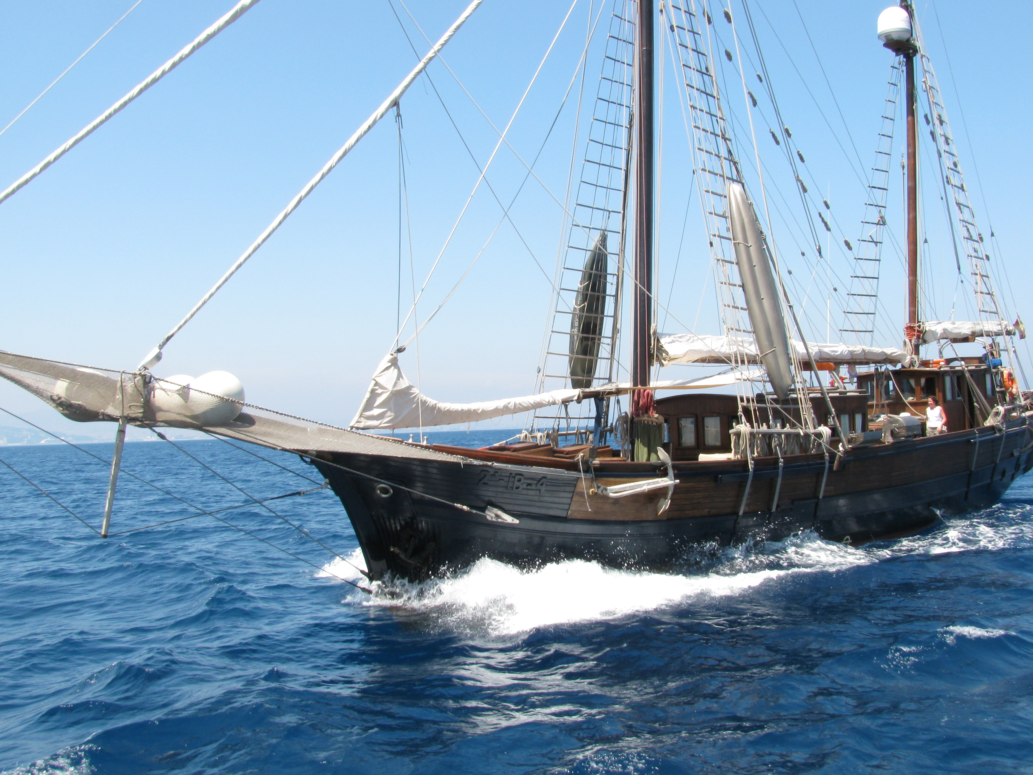 Barco Regata Puig, Barcelona, 2010